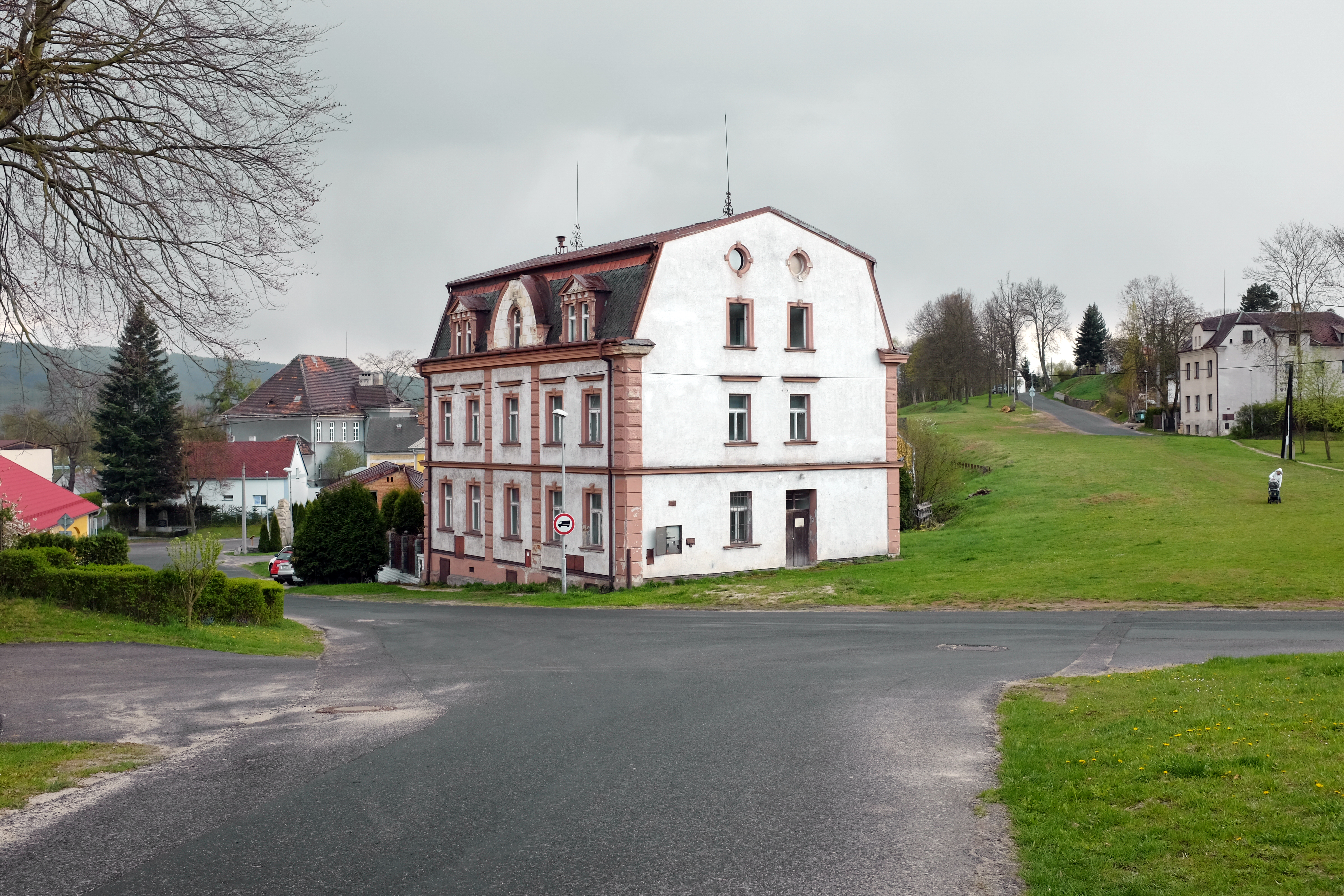 Obec Citice, okres Sokolov